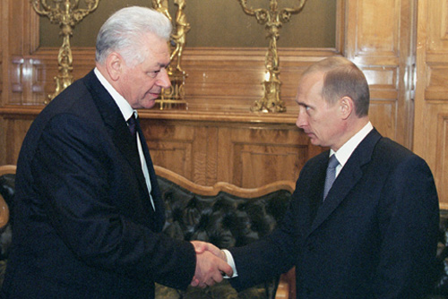 МОСКВА, КРЕМЛЬ. С Председателем Госсовета Дагестана Магомедали Магомедовым.